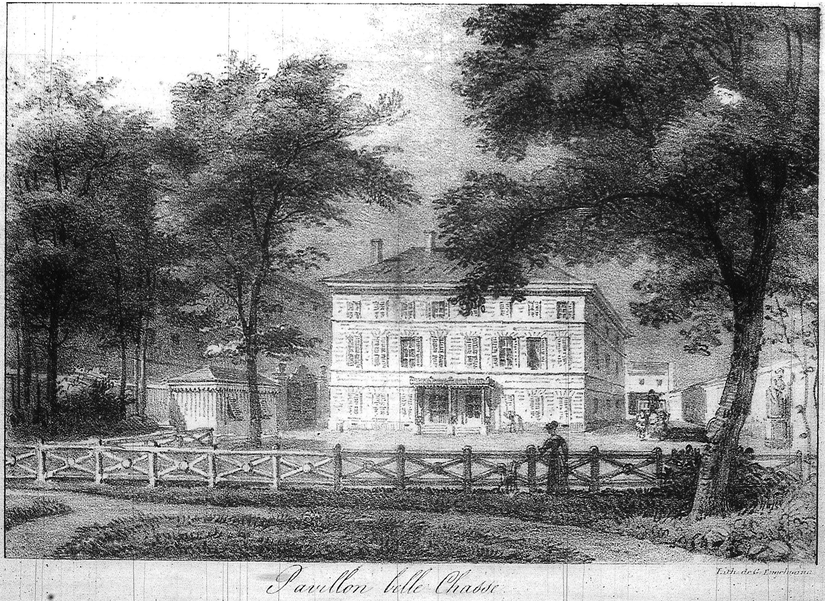 issu du fonds iconographique de Reims.